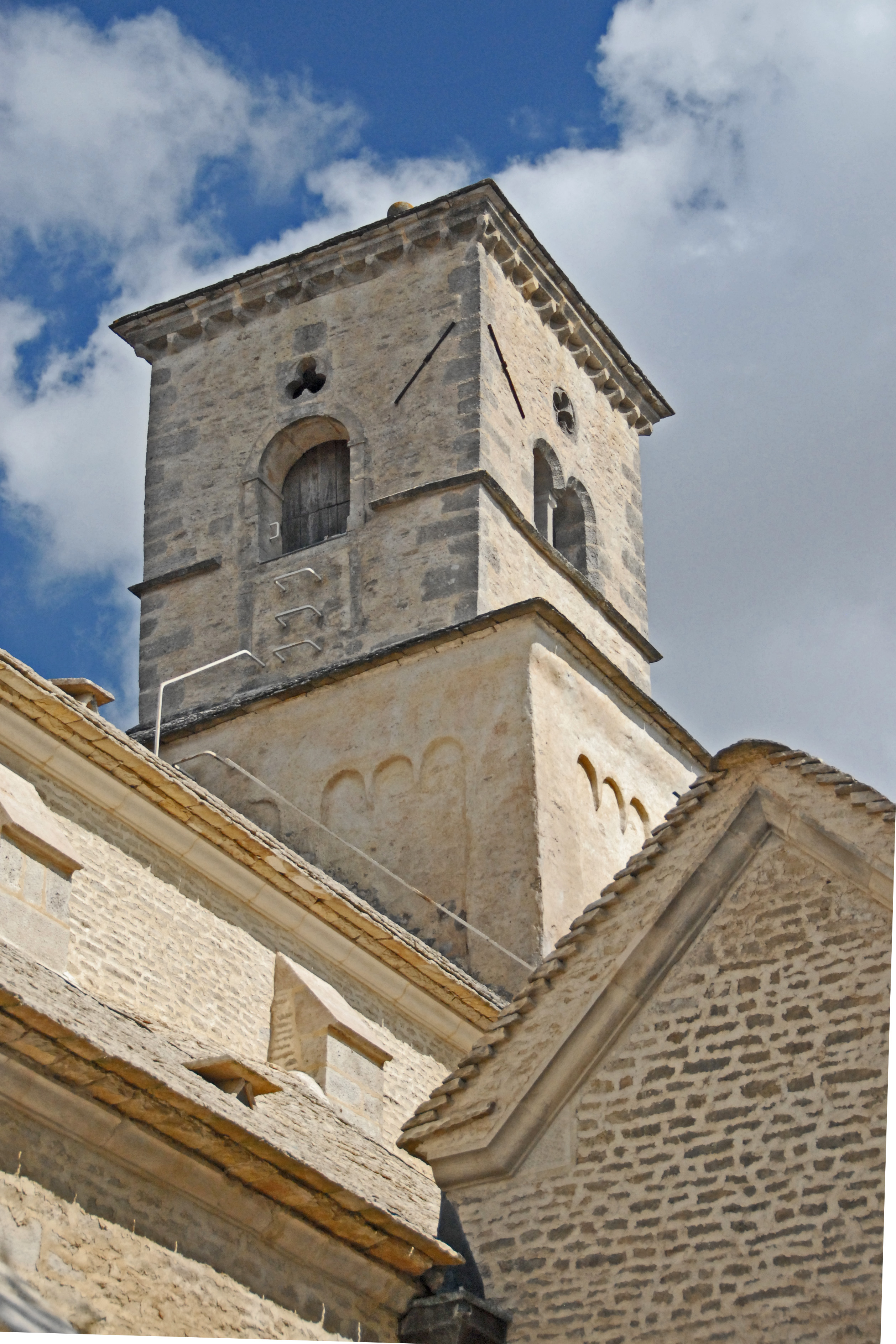 St-Vorles de Châtillon-s-S, Vierungsturm von S